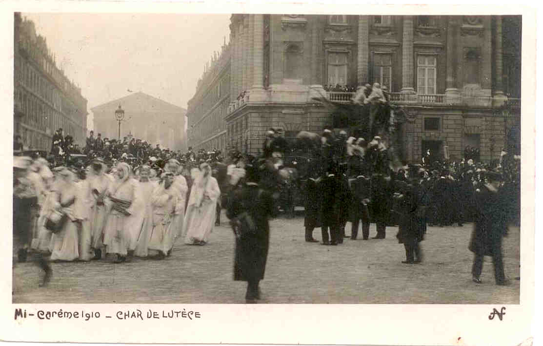 Le char de Lutèce au cortège de la Mi-Carême parisienne en 1910.